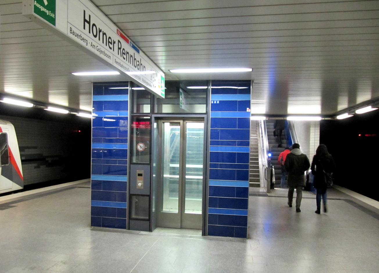 Fahrstuhl auf der Bahnsteigebene in der U-Bahn-Haltestellte "Horner Rennbahn".